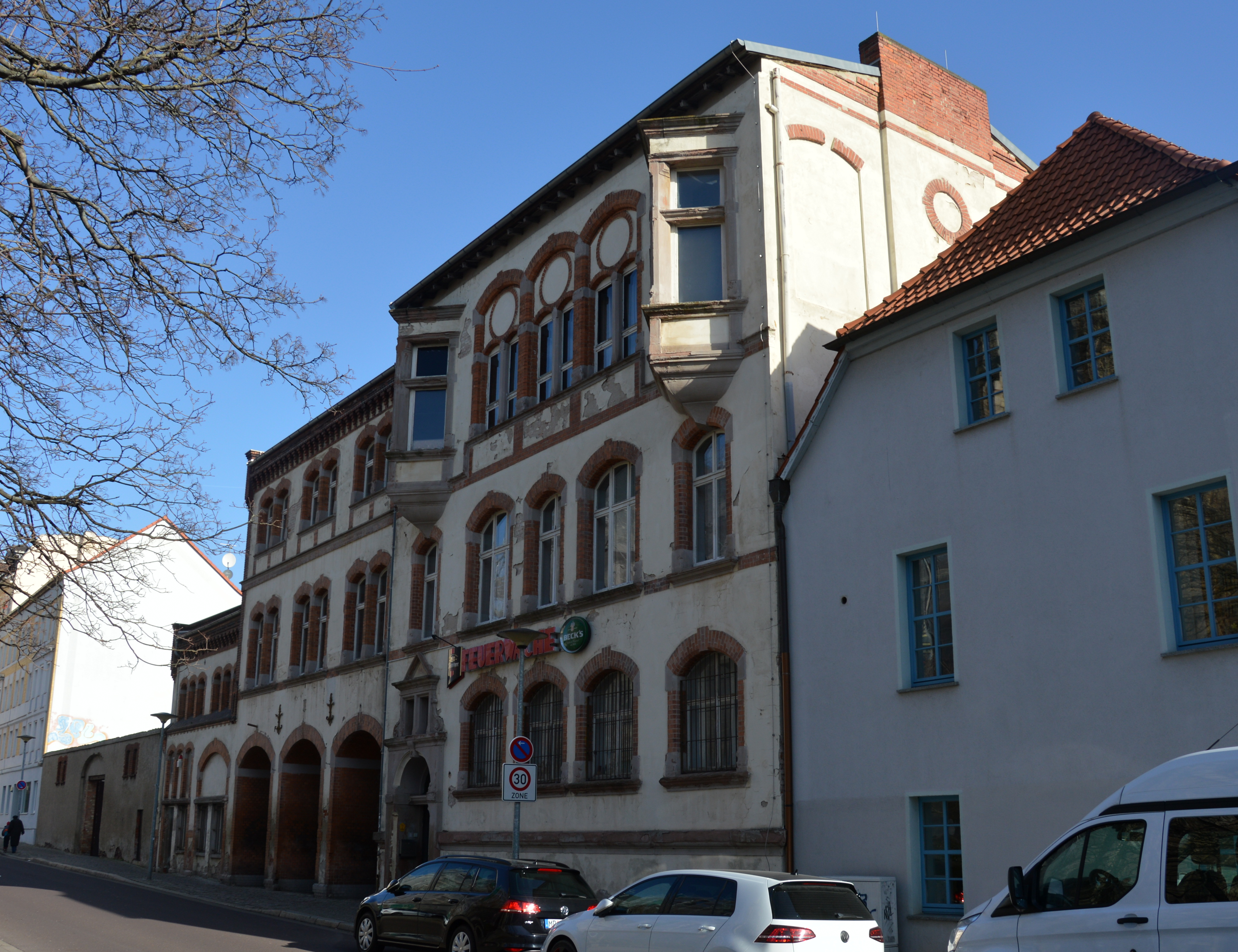 Haus Halberstädter Straße 140 in Magdeburg